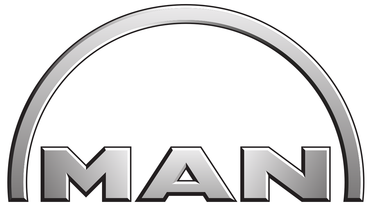 Logo von MAN